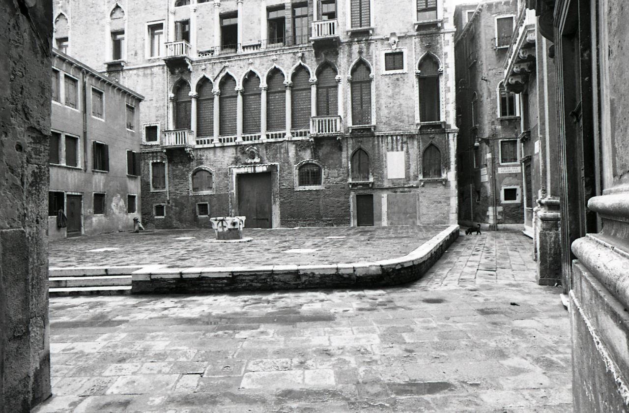 Servizio fotografico : Venezia, 1981 / Paolo Monti. - Strisce: 5, Fotogrammi complessivi: 27 : Negativo b/n, gelatina bromuro d'argento/ pellicola ; 35 mm. - ((Sul portanegativi: N[I]K[MA]T Tri-X. - La serie è identificata da Monti con segni grafici e distinta dalla successiva. - (4):. - - Palazzo Fortuny;. - - Muri con disegni e impronte;. - - Campo San Beneto;. - - Campo Sant'Angelo?. - Occasione: Seminario di fotografia a Palazzo Fortuny e Documentazione per la pubblicazione: Crivellari Domenico (a cura di), Venezia, Milano, Electa, 1982. - Fonte: Agenda di Paolo Monti: Nikon Leika 3001-/ Monti 1978 (1978-1982), presso Archivio Paolo Monti. - Fonte: Monografia di Crivellari Domenico (a cura di): Venezia, Milano, Electa (1982)